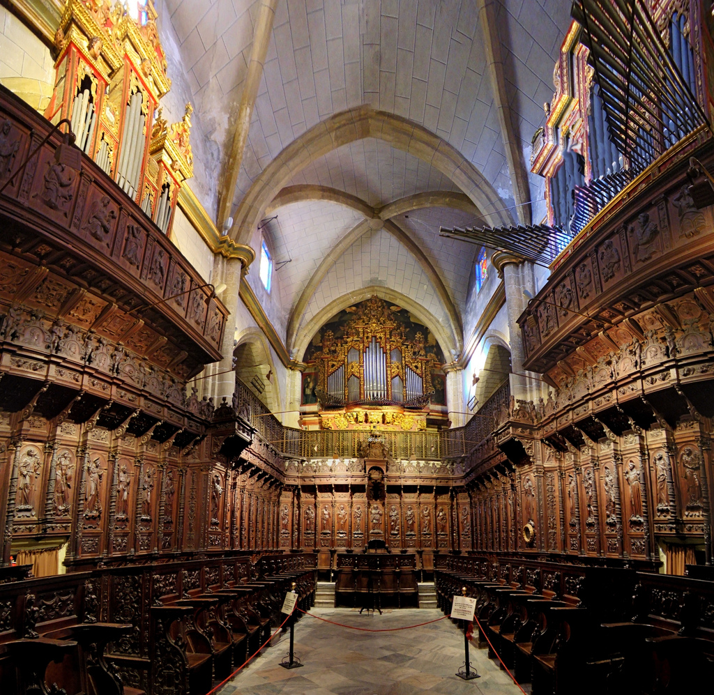 Coro y órganos de la S.I. Metropolitana San Juan Bautista de Badajoz